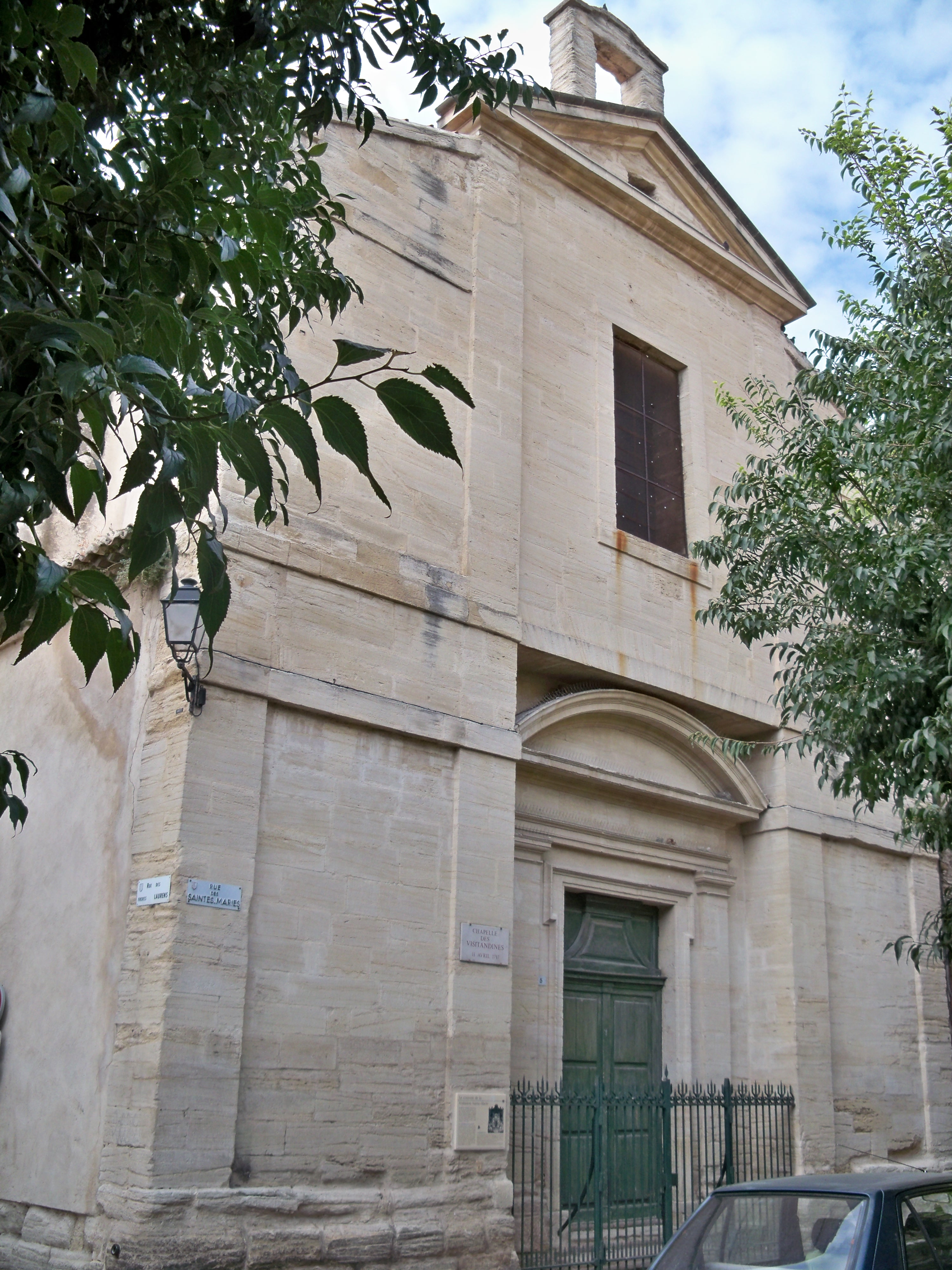 Facade de l'ancien couvent de la Visitation de Marie, Carpentras, France